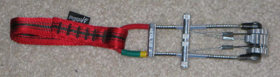 Metalius tri-cam camming device